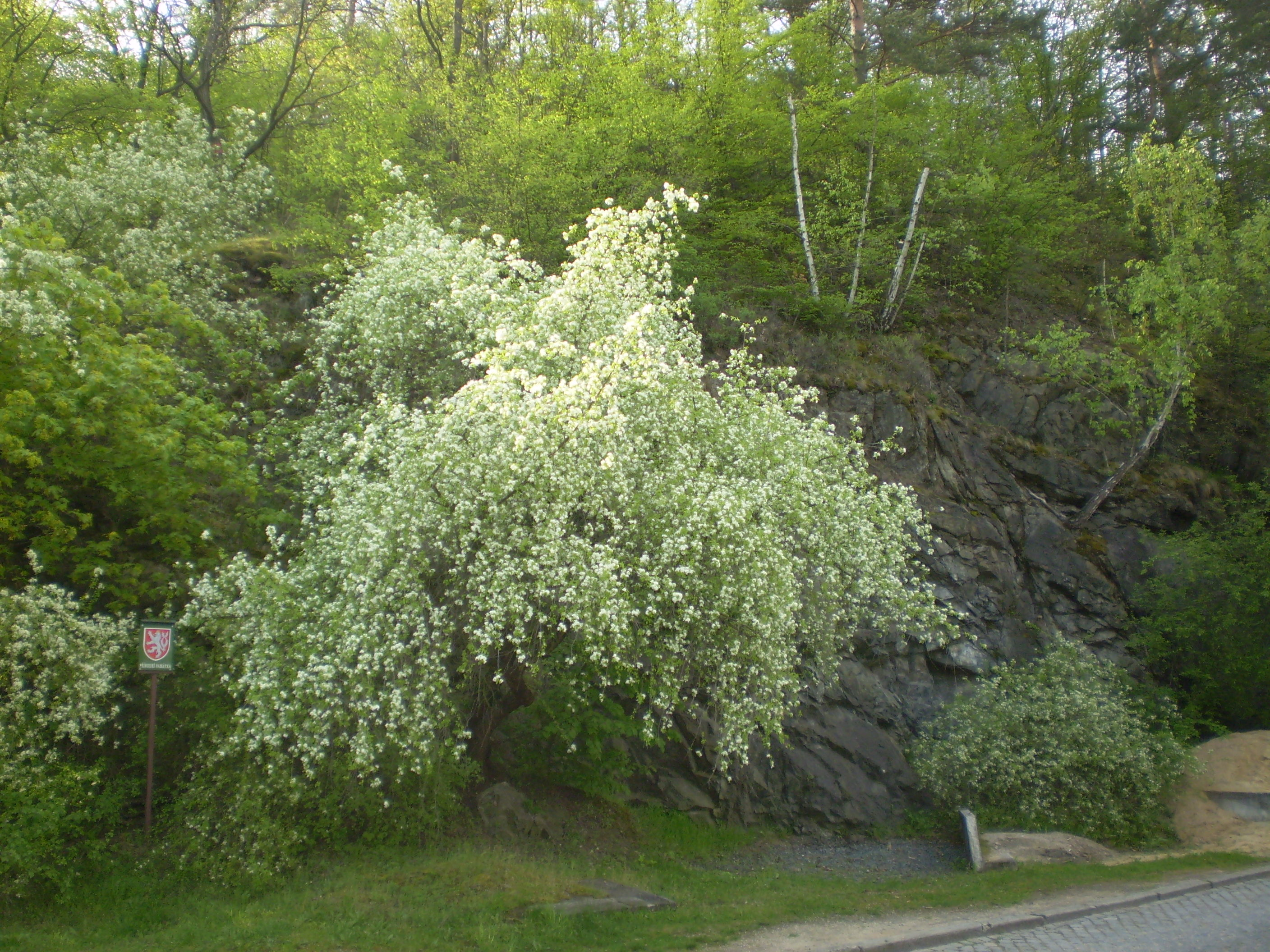 Přírodní památka Skalky u Přehrady, která se nachází v Brně poblíž hráze na Brněnské přehradě. Chráněné skály jsou po obou stranách hráze, tato je po pravé straně ve směru toku Svratky.